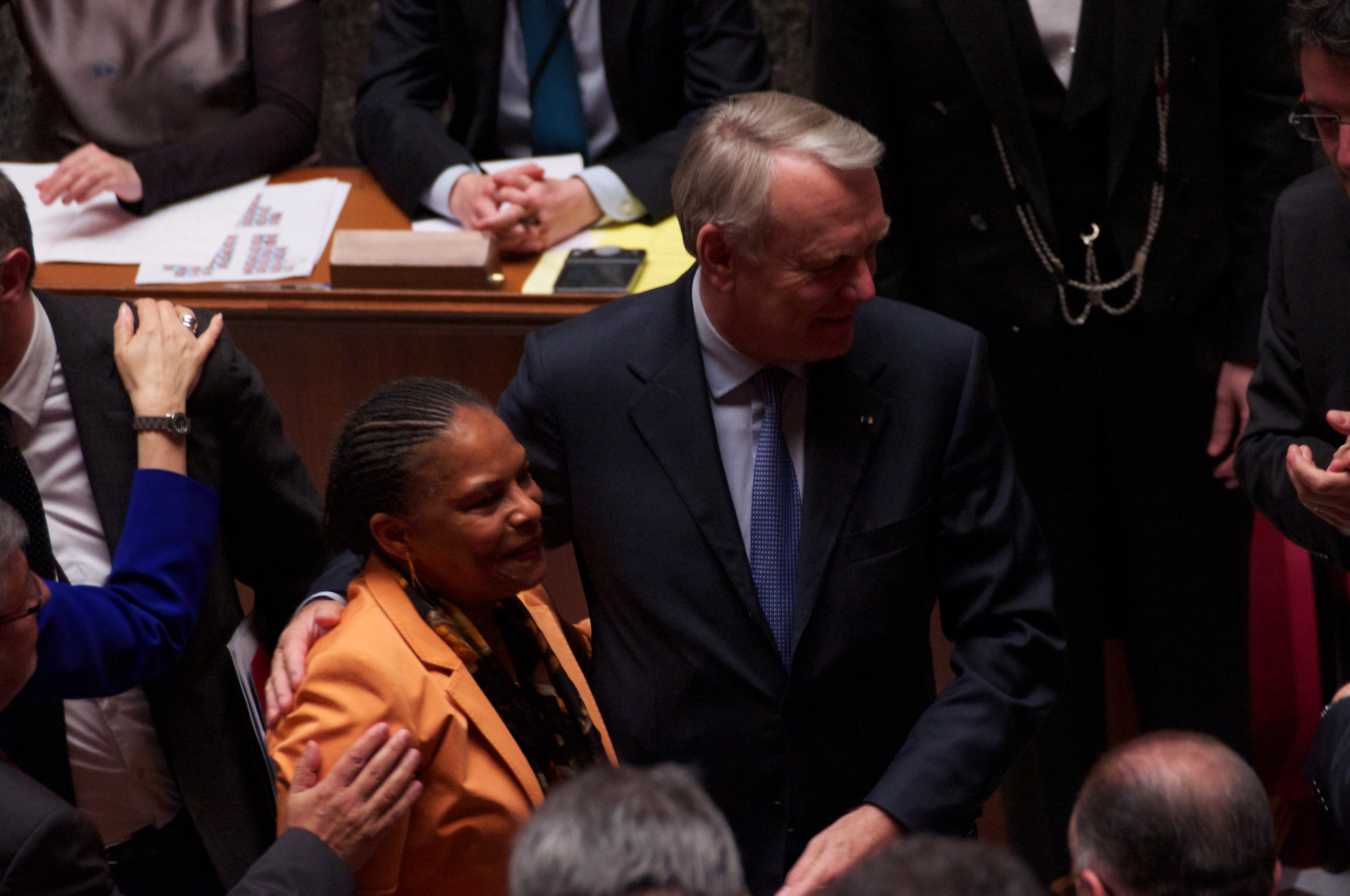 Christiane Taubira et Jean-Marc Ayrault après le vote solennel de la loi ouvrant le mariage aux couples de personnes de même sexe - Assemblée nationale